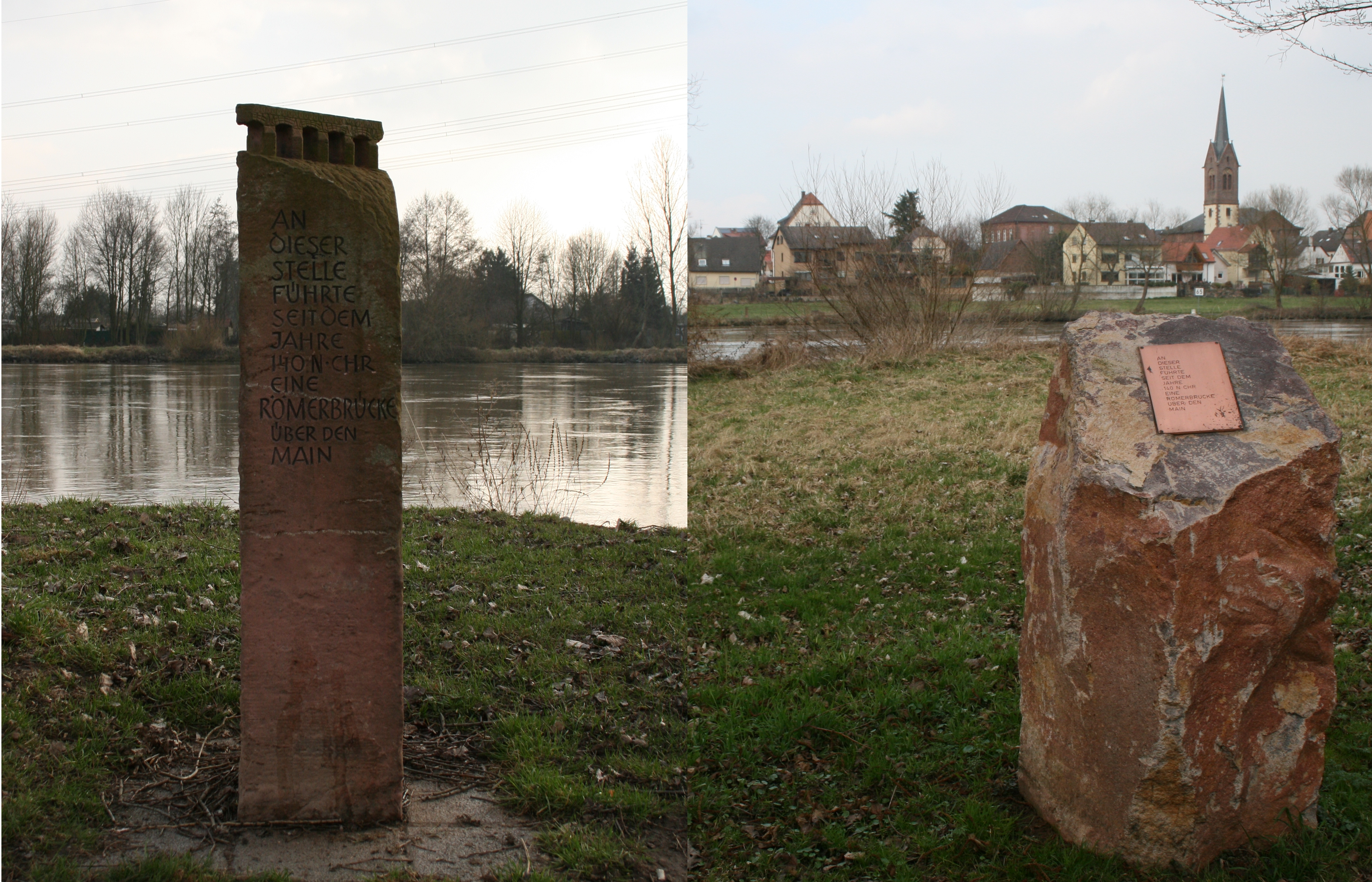 Hinweissteine auf eine römische Mainbrücke am Kastell Großkrotzenburg. Links nördliches Mainufer, rechts Stein südlich des Mains.